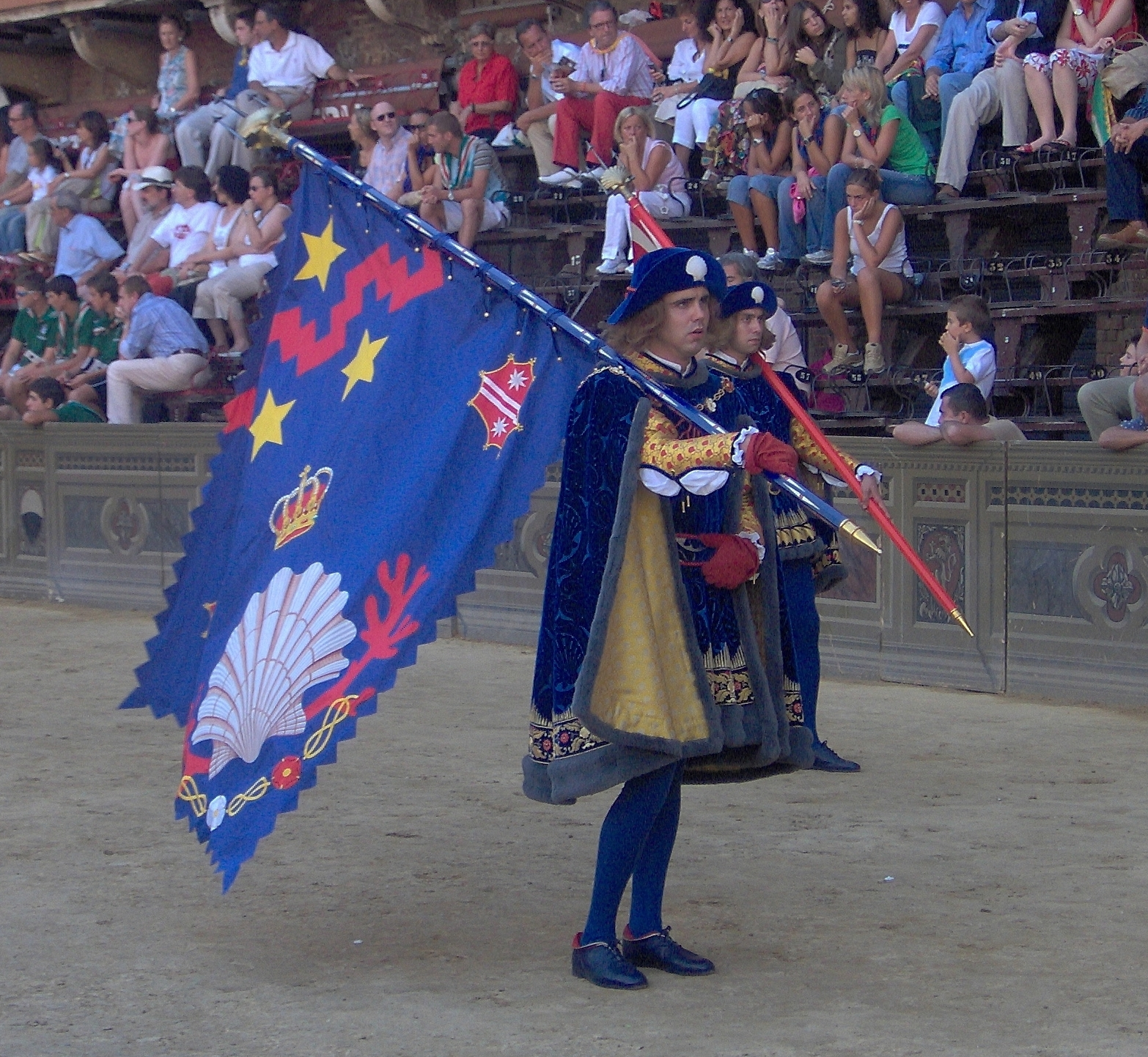 Palio dell'Assunta (16/08/2006) - Siena